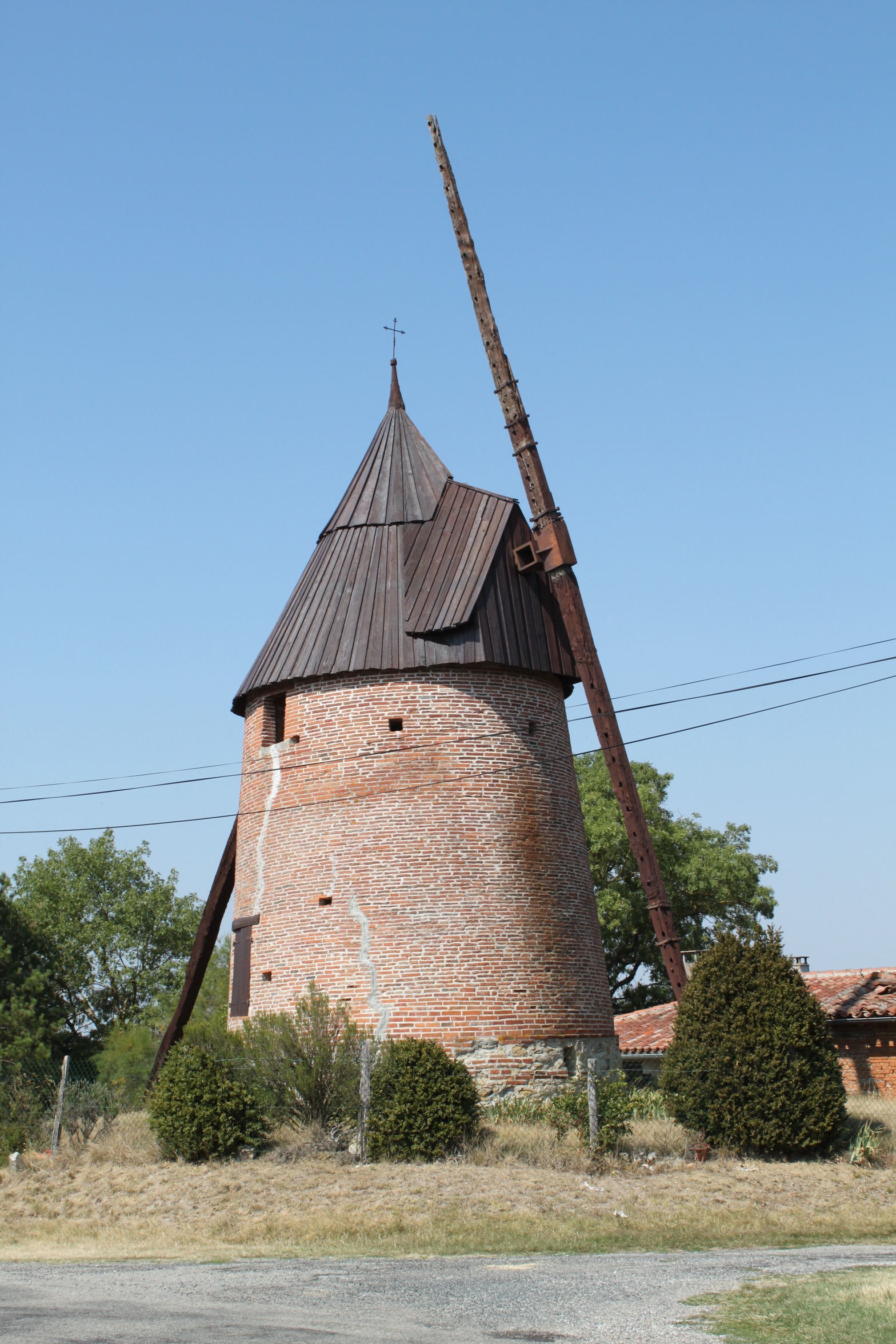 Moulin à vent de la Paillasse, La Paillasse (Inscrit, 1950) .